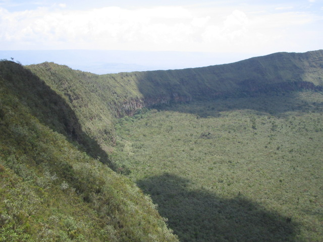 Kratern på Mount Longonot i Rift Valley, Kenya. The crater of Mount Longonot in Rift Valley, Kenya